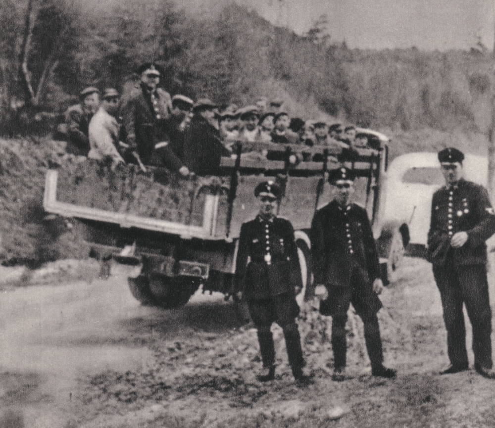 Praca przymusowa, polscy rolnicy pochwyceni przez policję niemiecką, Polska 1941